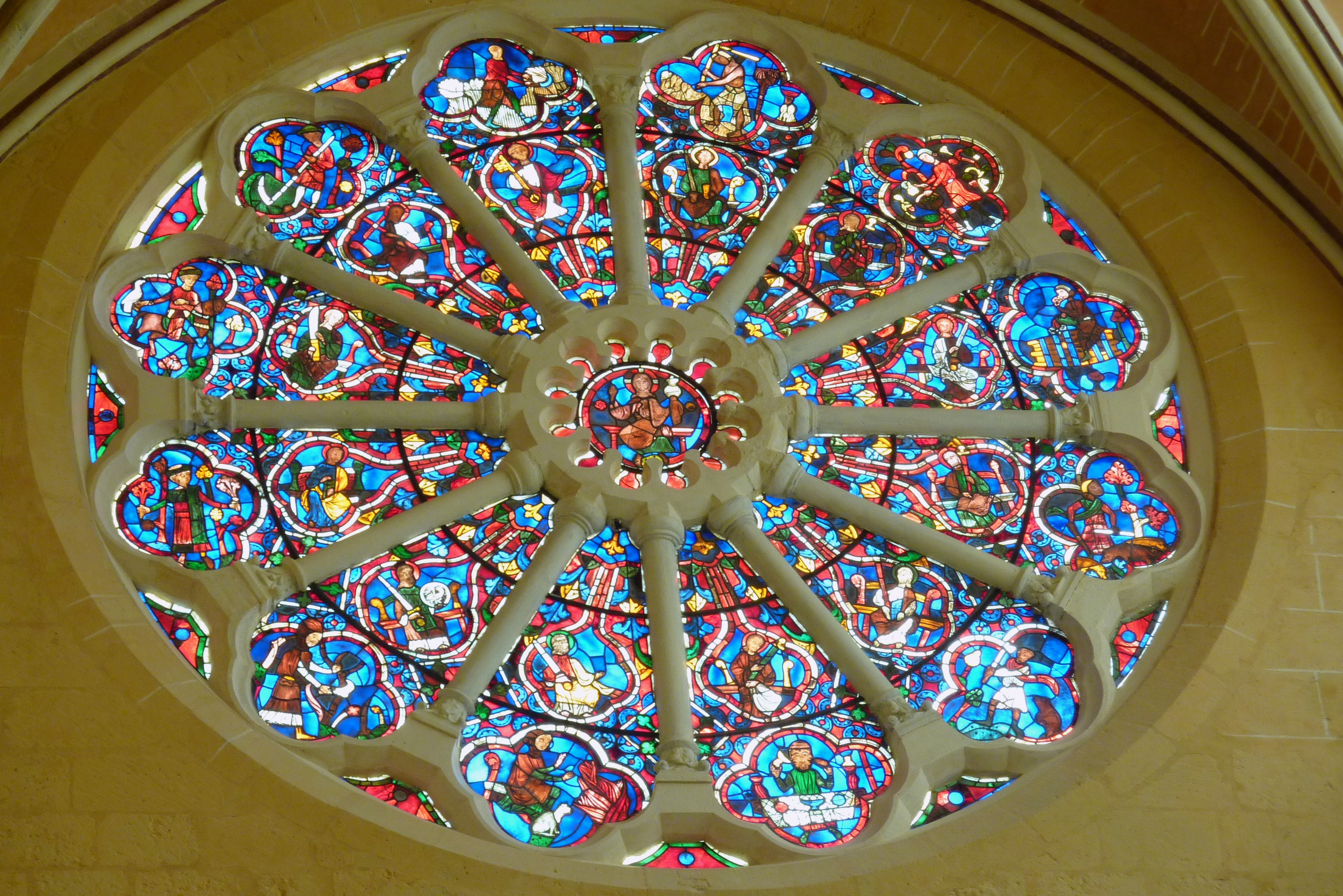 Katholische Pfarrkirche Saint-Étienne in Brie-Comte-Robert im Département Seine-et-Marne in der Region Île-de-France (Frankreich), Rosette, Darstellung: Christus und die zwölf Apostel, aus dem 13. Jahrhundert